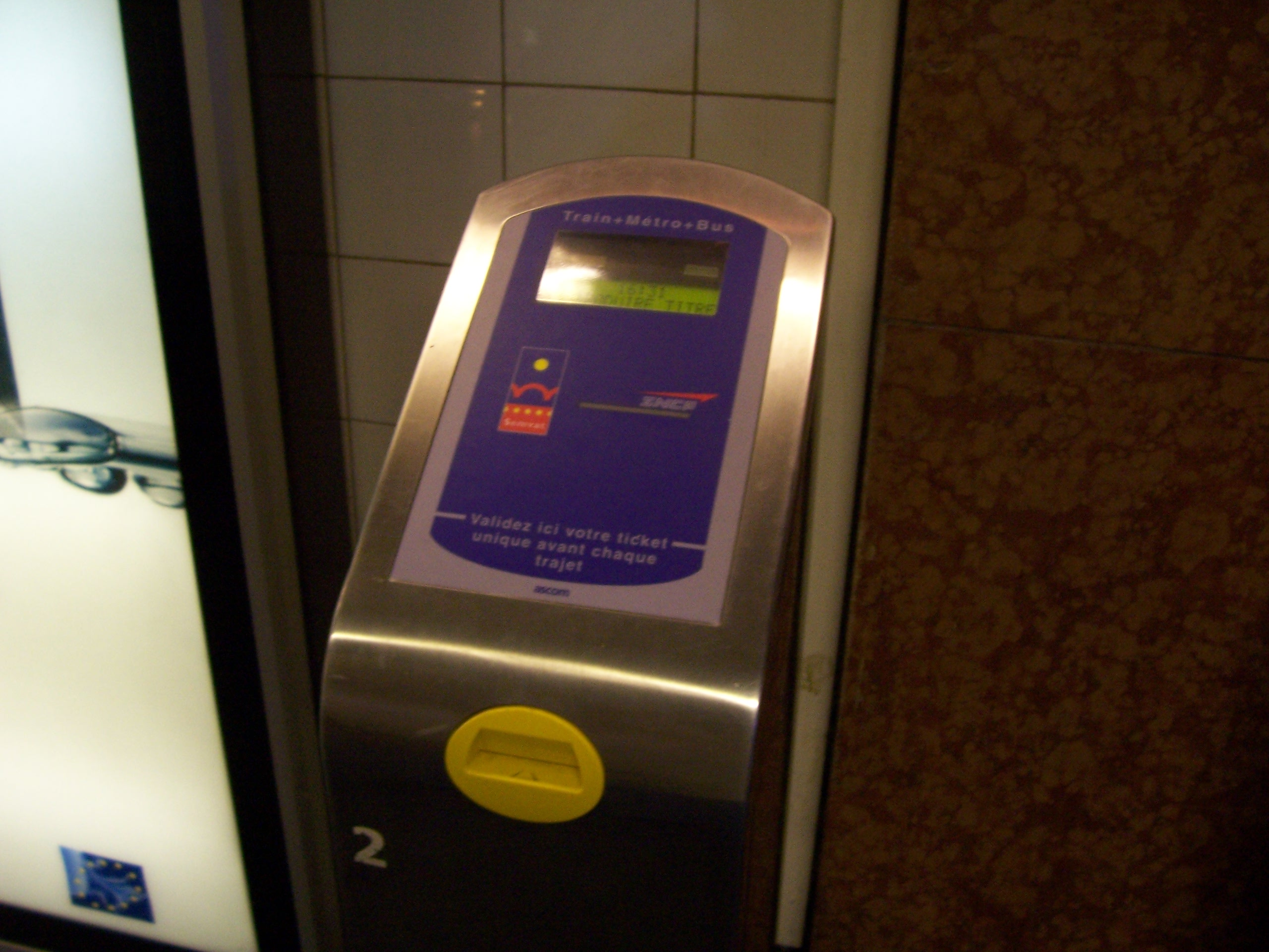 Validateur Tisséo SNCF sur la ligne D.